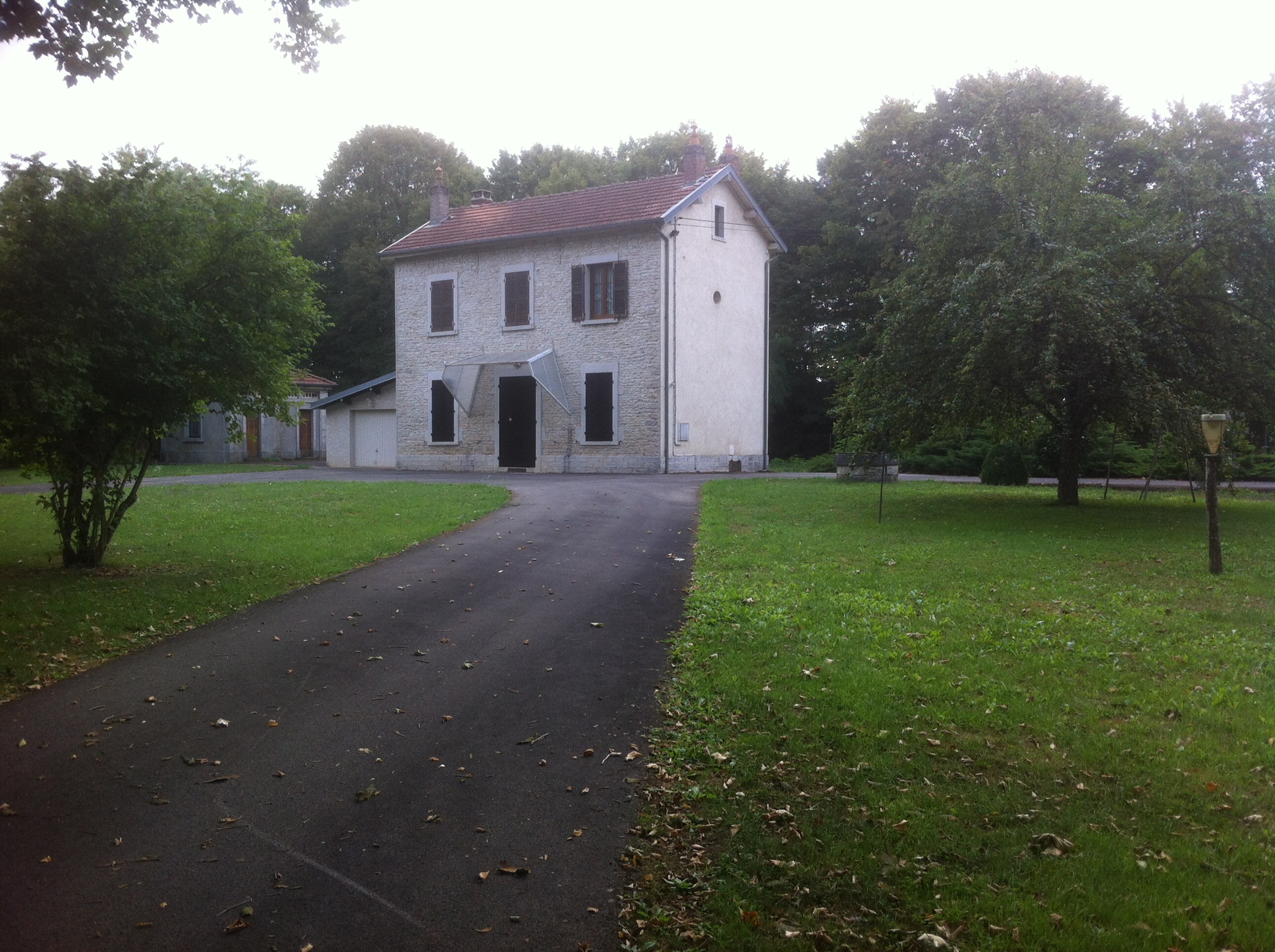 La gare en MAÂTZ en 2015